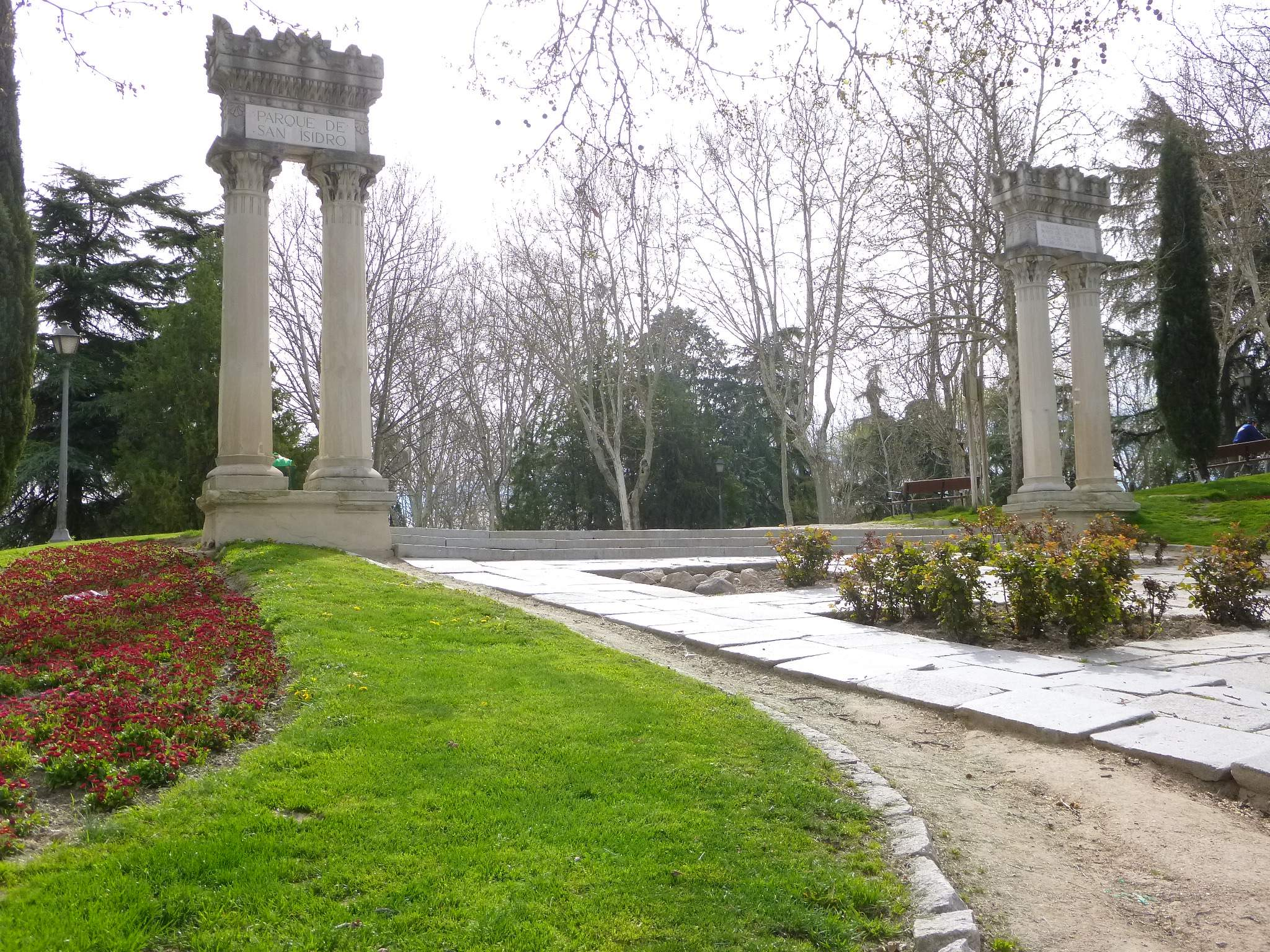 Parque de San Isidro (Madrid)